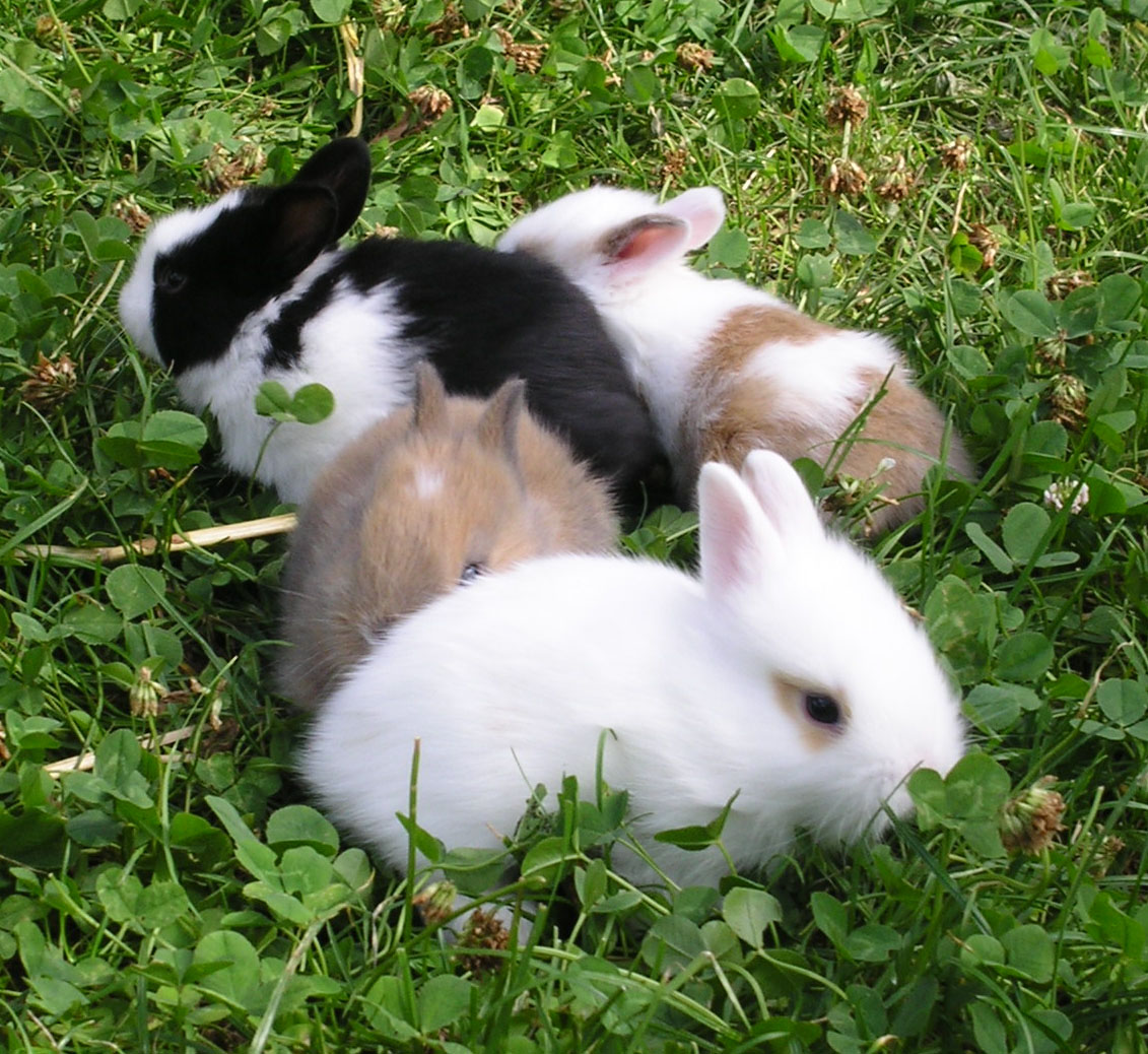 Vier ca. 2 Wochen alte Kaninchen